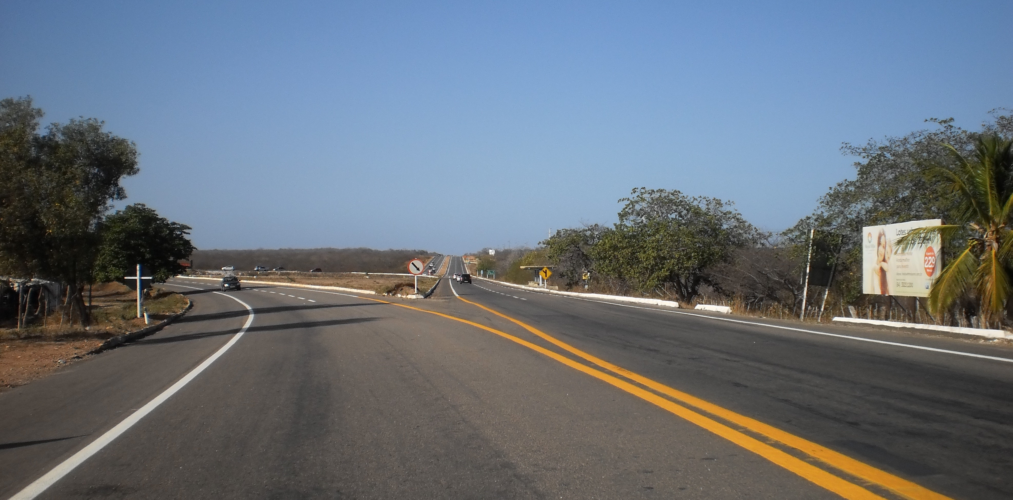 Rodovia federal BR-304 (à esquerda, saída para Fortaleza-CE) e rodovia estadual RN-013 (à direita, em linha reta) em Mossoró, Rio Grande do Norte, Brasil, saída para Tibau.